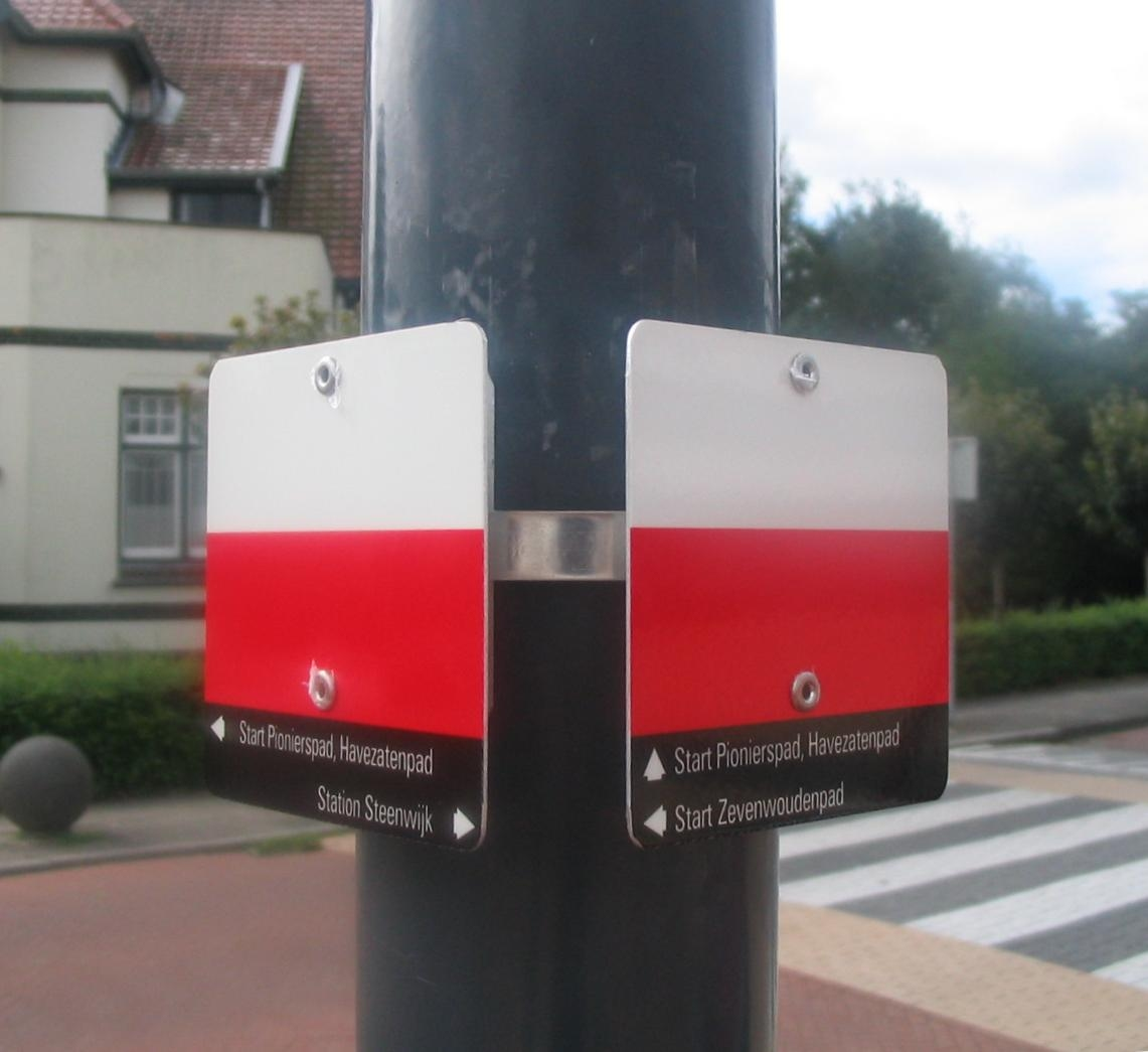 Splitsingsbordje